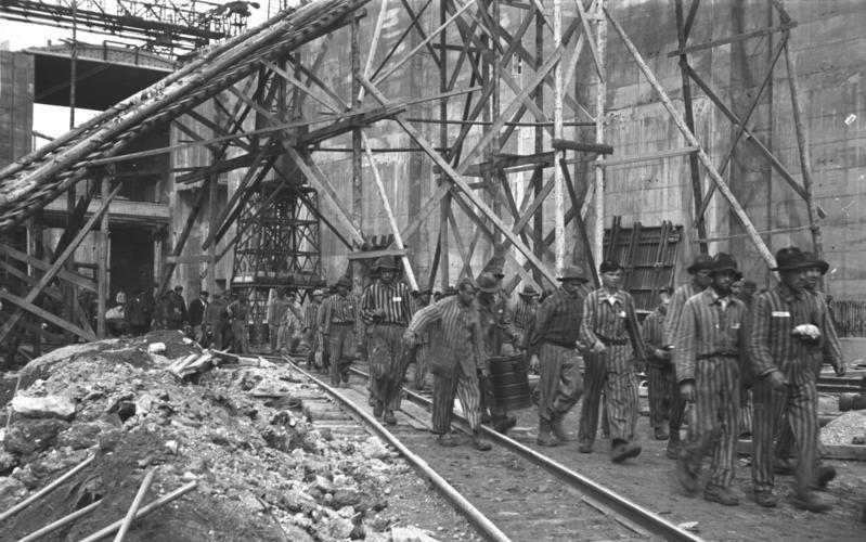 Bremen-Farge, U-Boot-Bunker "Valentin", Bau Bremen-Farge.- Bau des U-Boot-Bunker "Valentin", Kolonne von Arbeitern (Zwangsarbeiter) neben Holzgerüst gehend